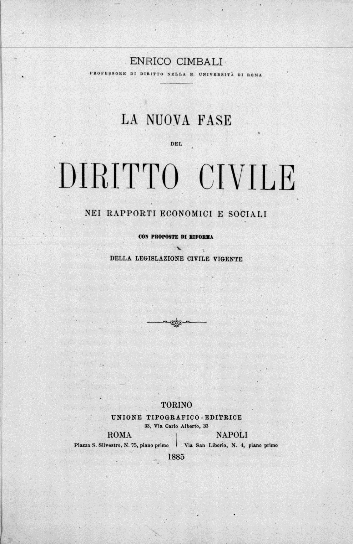 Frontespizio